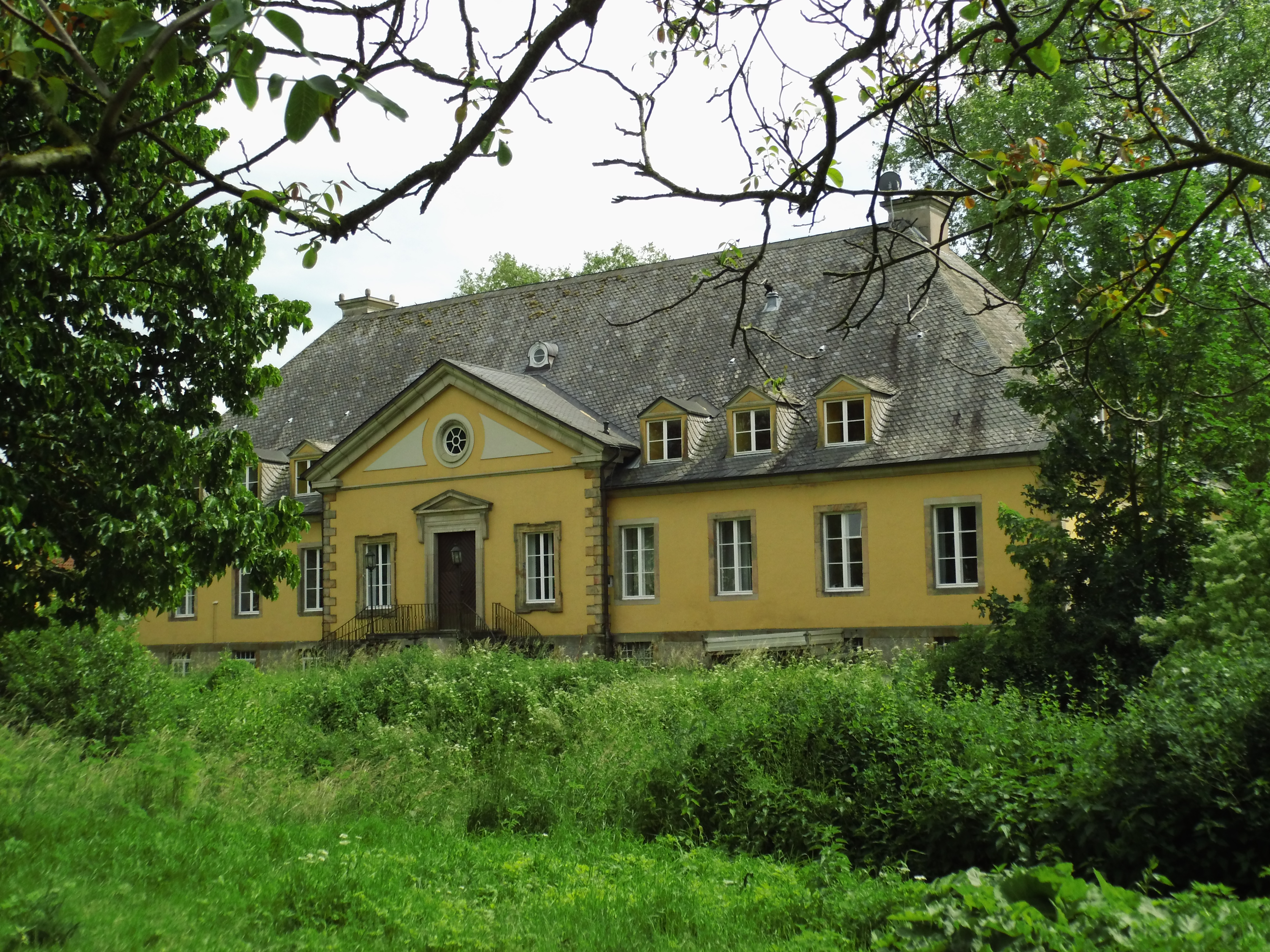 eingeschossiger Baukörper mit elf Fensterachsen. Der Mittelrisalit wird durch einen Dreieckgiebel abgeschlossen. Baudenkmal, Liste der Baudenkmäler in Willebadessen Nr. 26